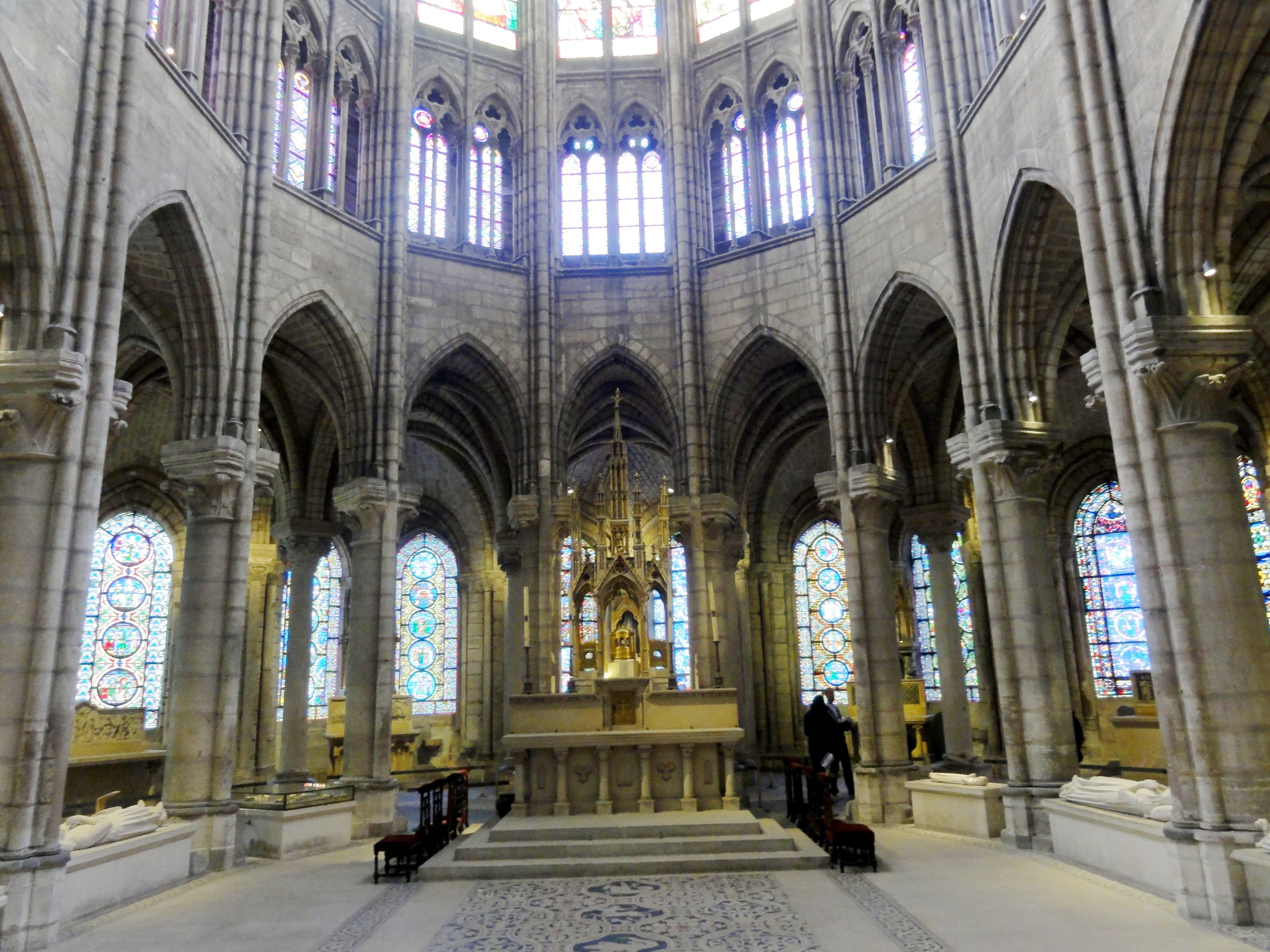 Abside.